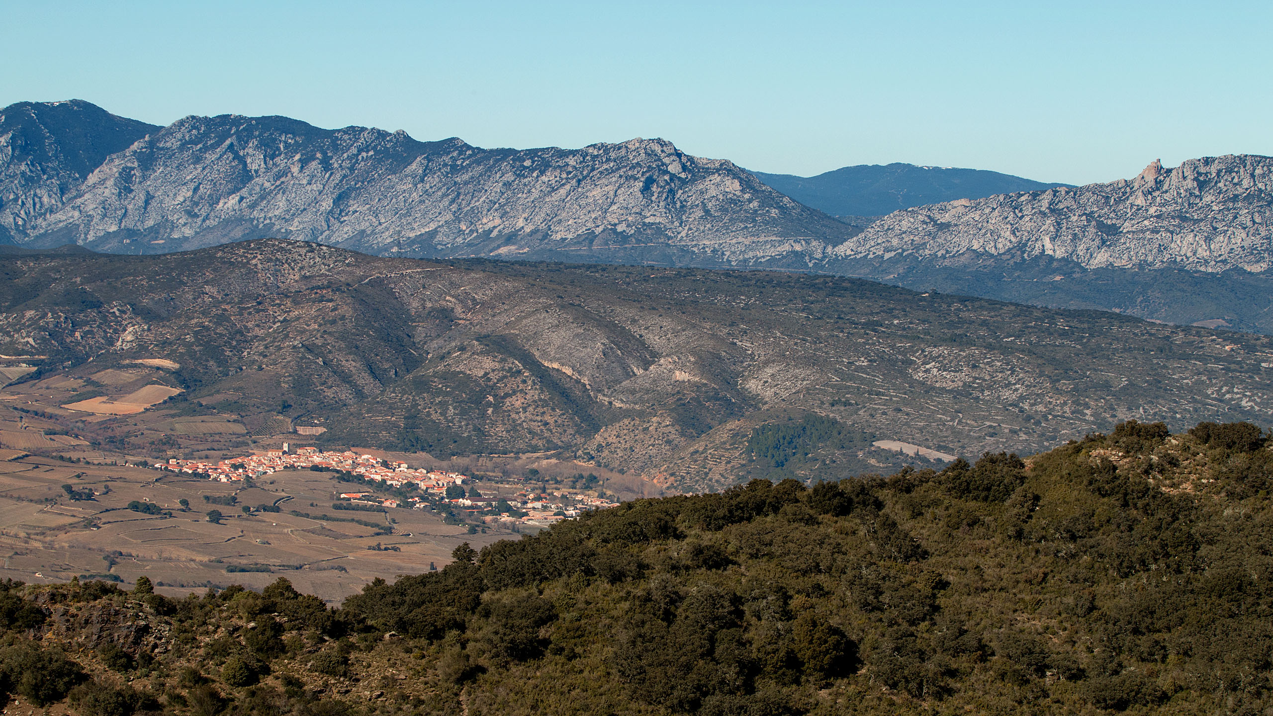 Vue générale